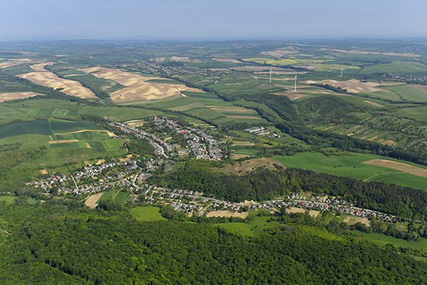 Jásd, távlati légi fotó